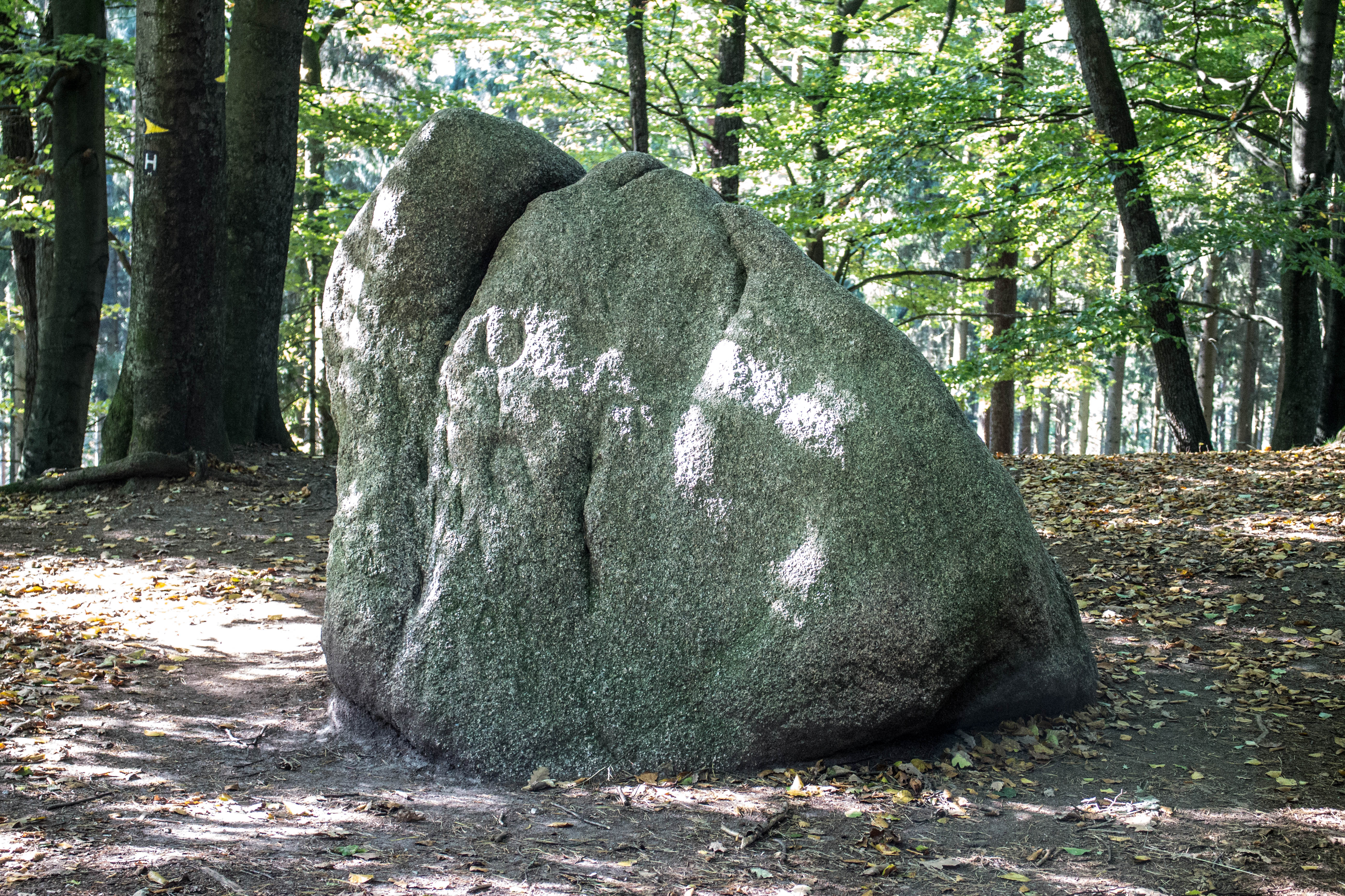 Karlstein bei Schwiederstorf (Ostseite)